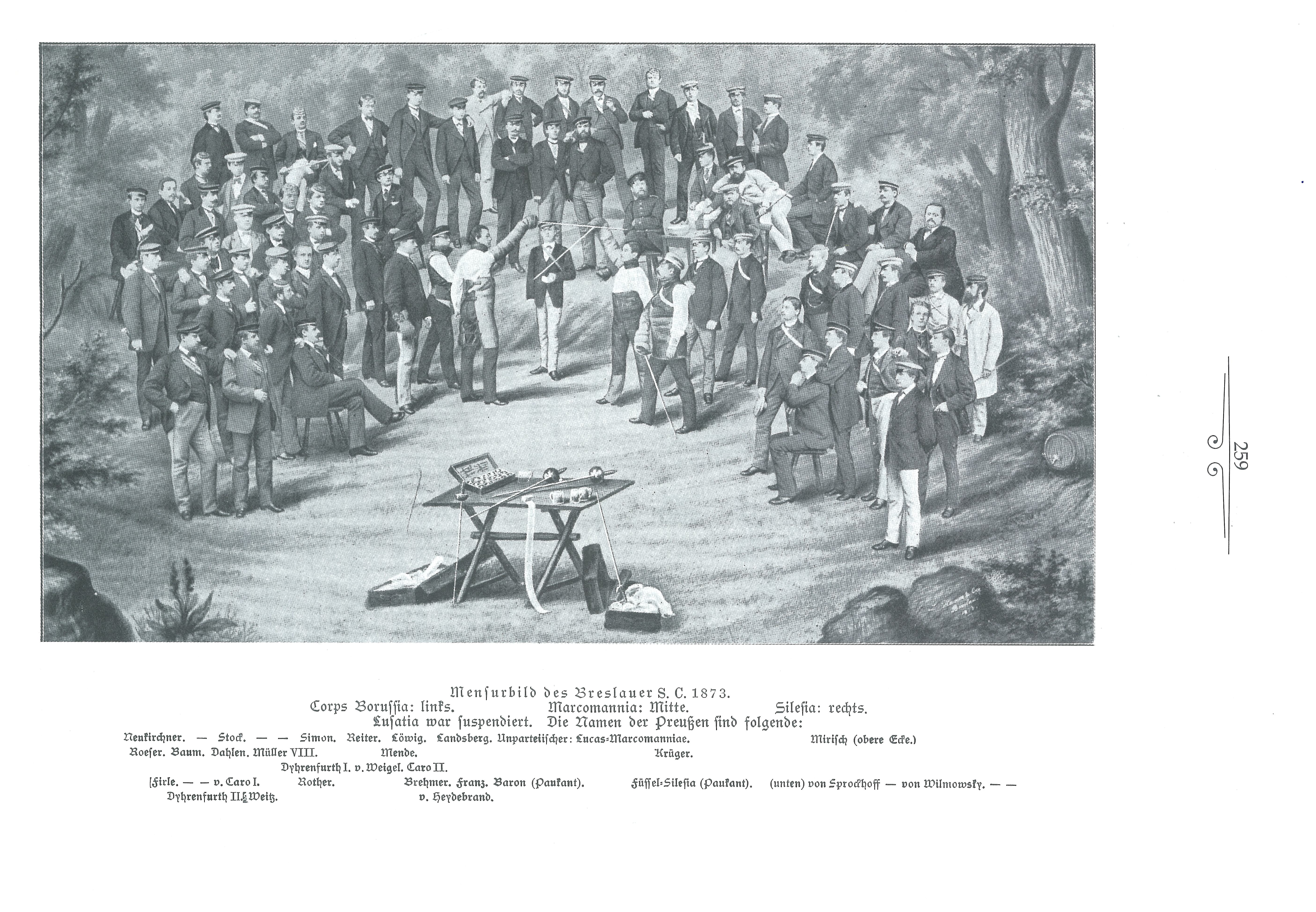 Mensurbild